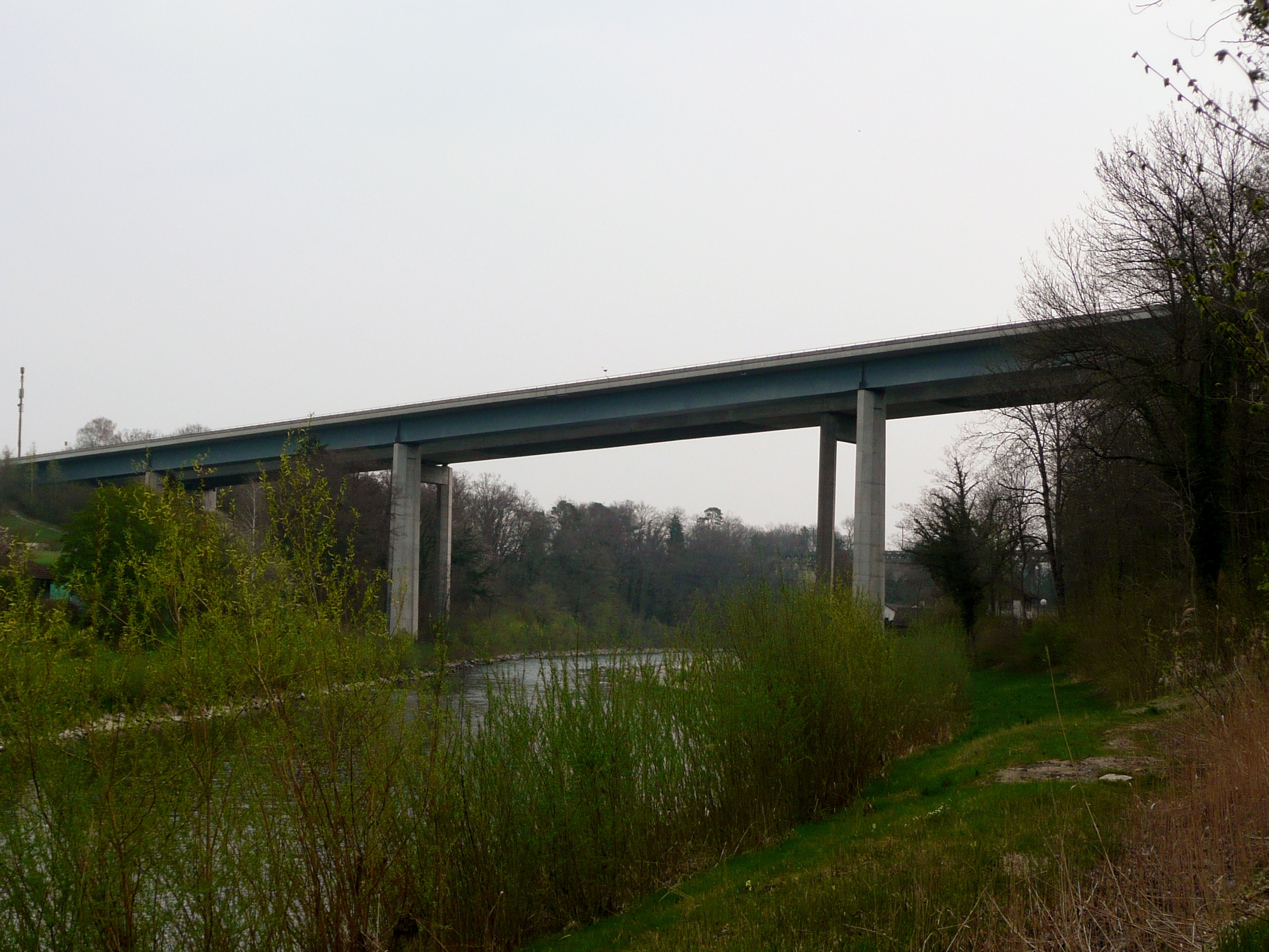 Weinlandbrücken über die Thur bei Andelfingen im Kanton Zürich/Schweiz. Im Vordergrund Brücke der Hauptstrasse 15, im Hintergrund Brücke der A4.